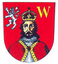 Znak města Nové Strašecí